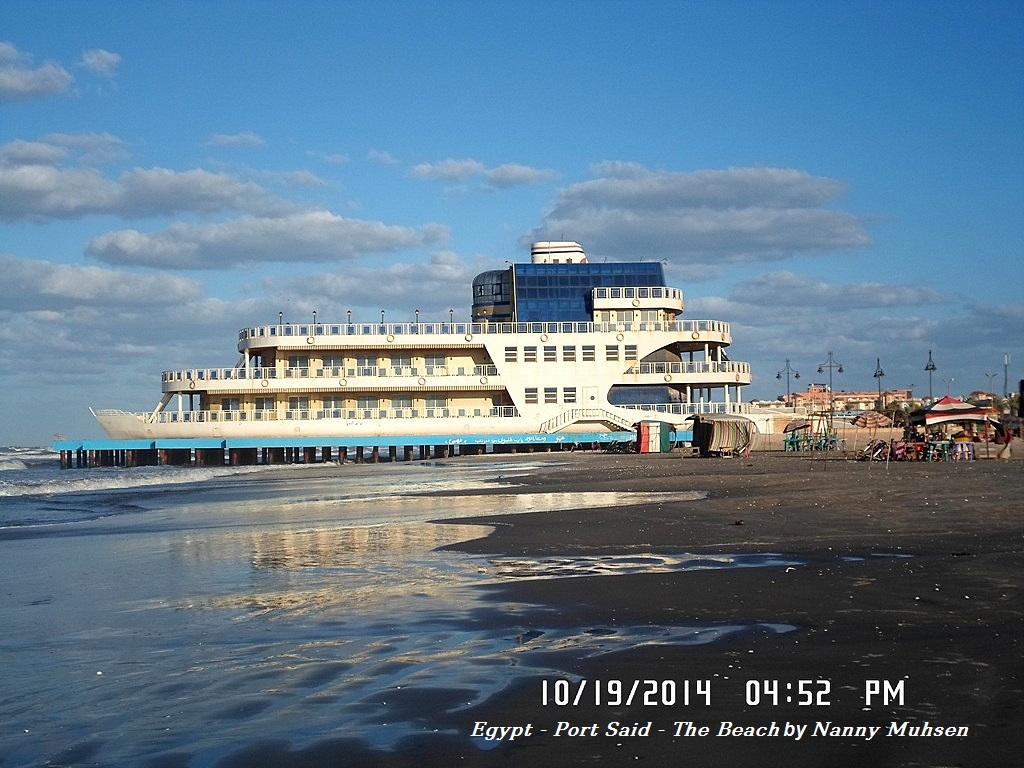 الكازينو العائم على شاطئ بورسعيد